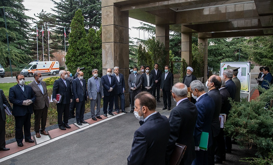 جلسه هیأت دولت/ ۲۸ اسفند ۹۸